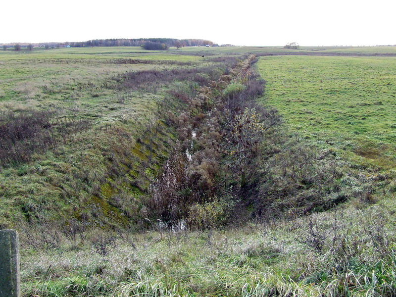 Molaina už Molainių II tvenkinio, Panevėžio raj.